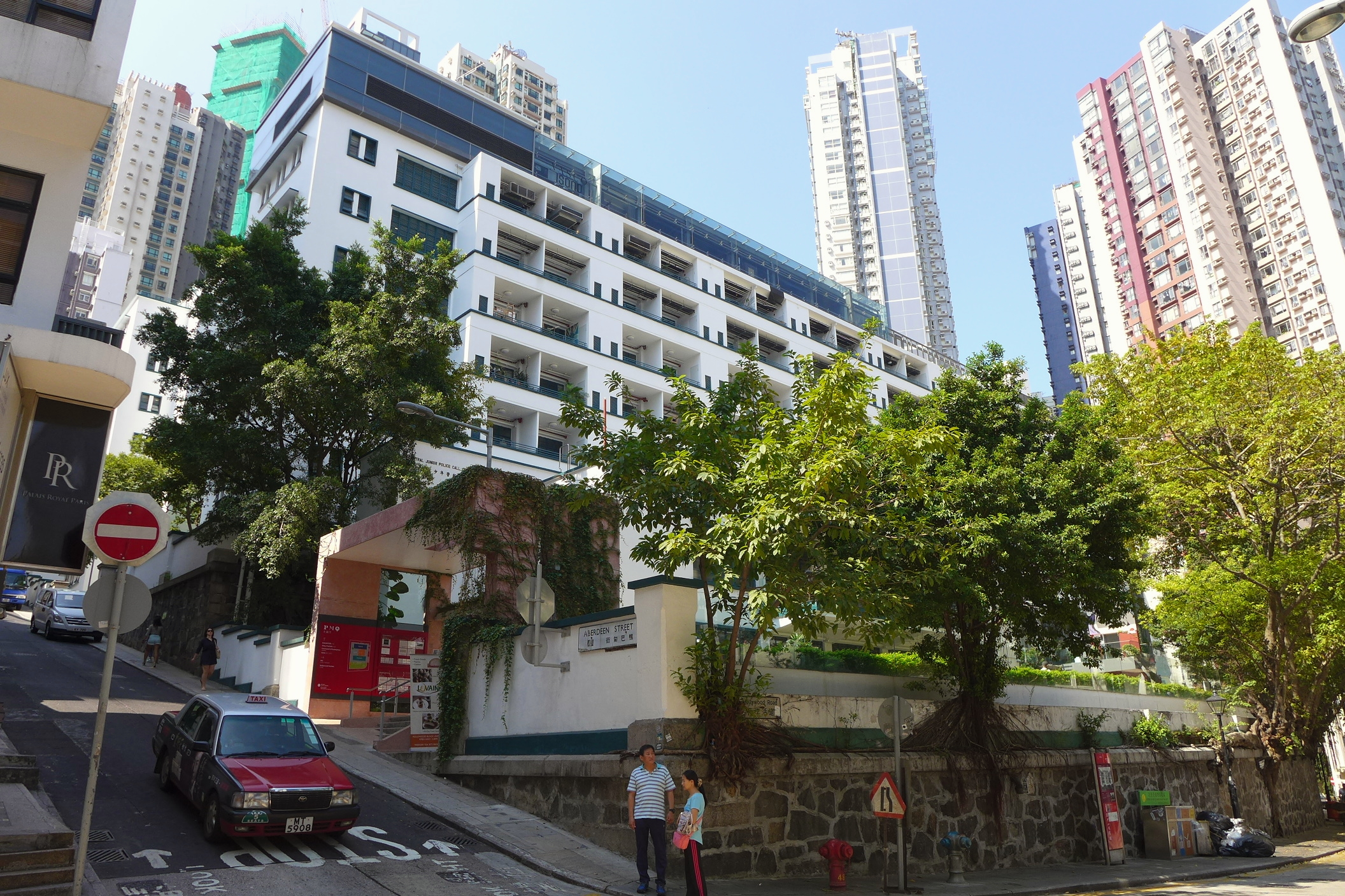 PMQ